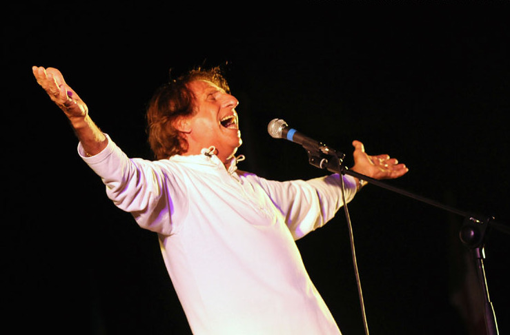 fotografia fatta durante il concerto di Paolo Mengoli